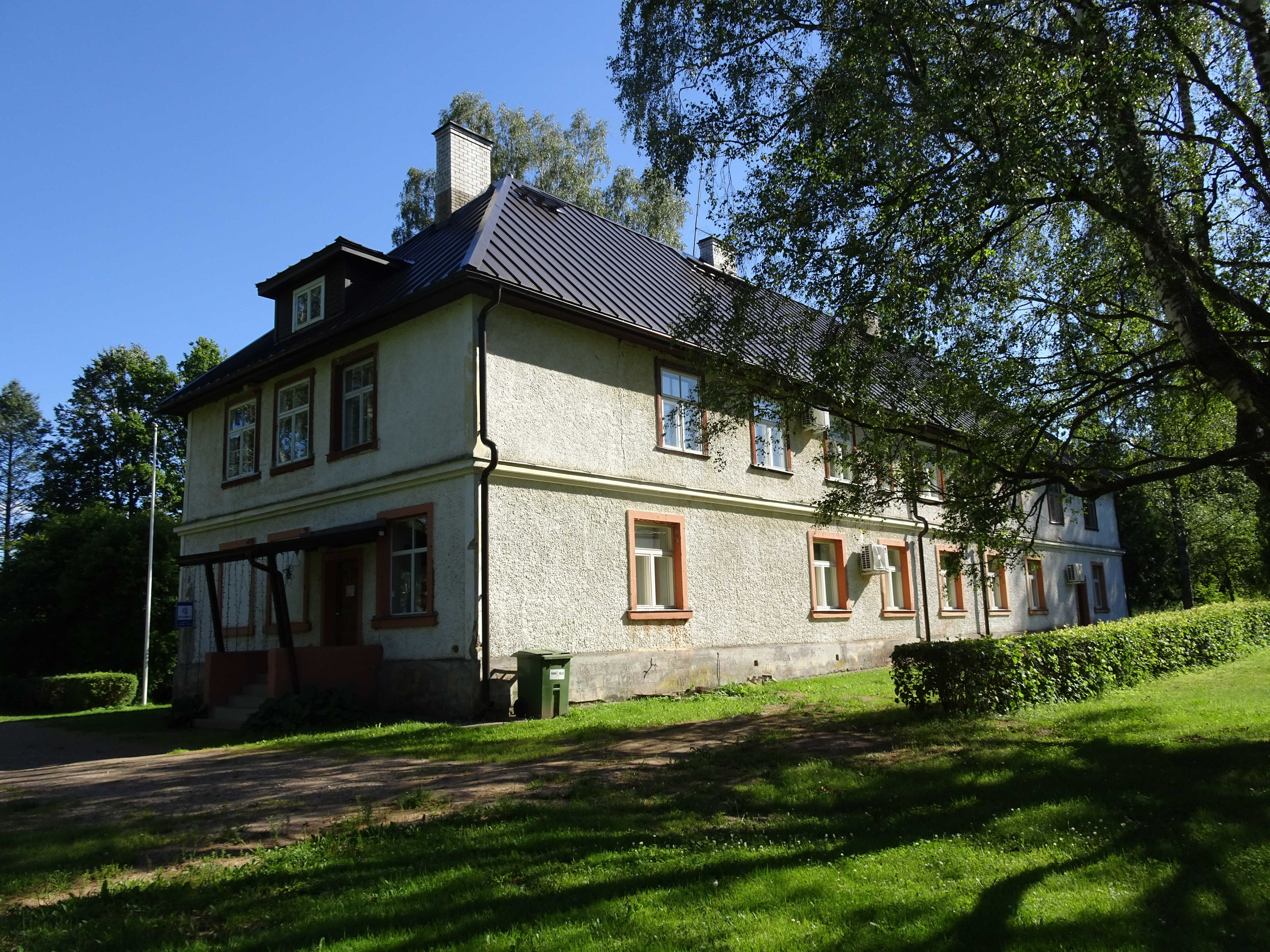 Võõpste raamatukogu endises koolimajas. Arhitekt David Roos (†1934)